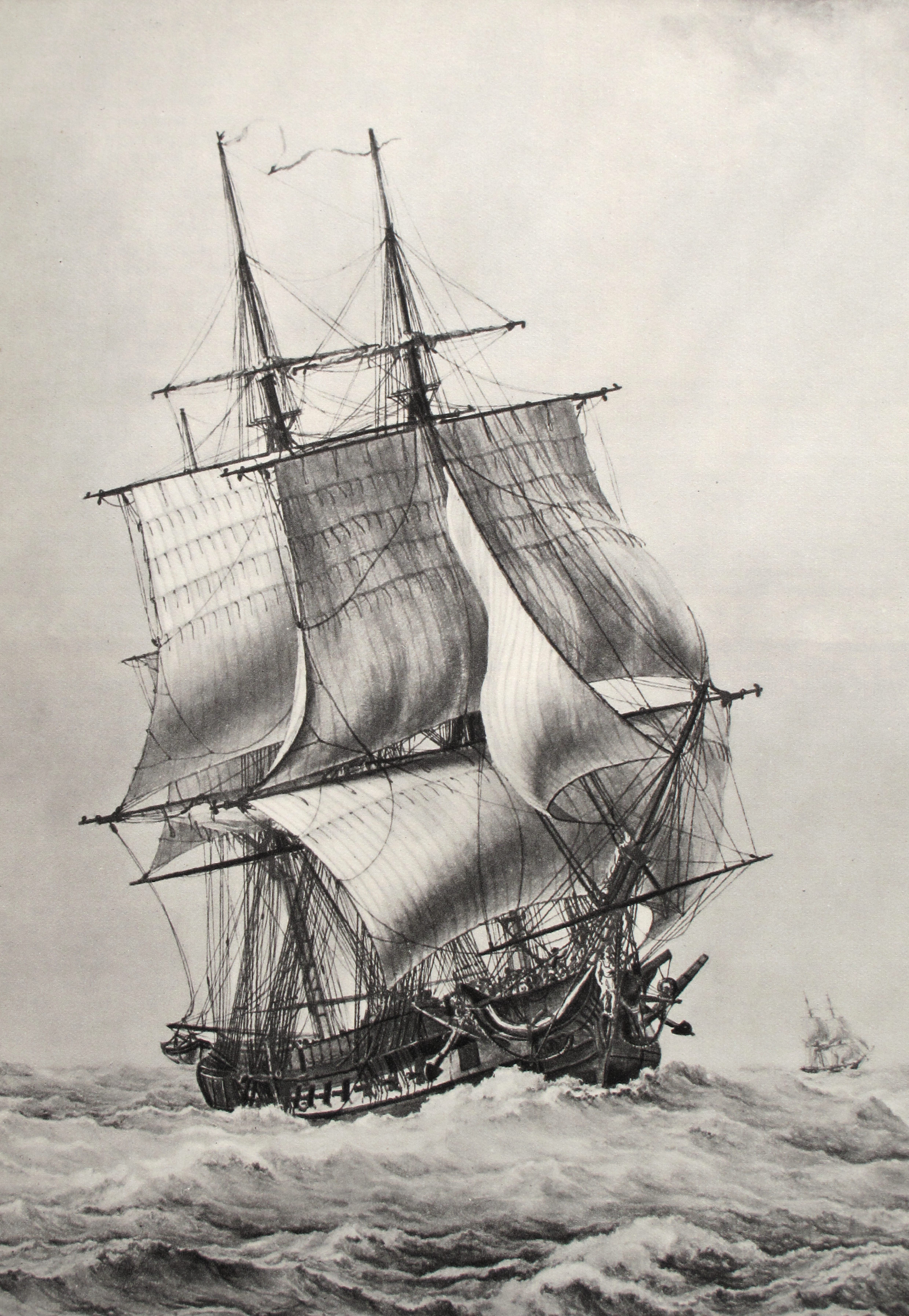 Frigate Pomone